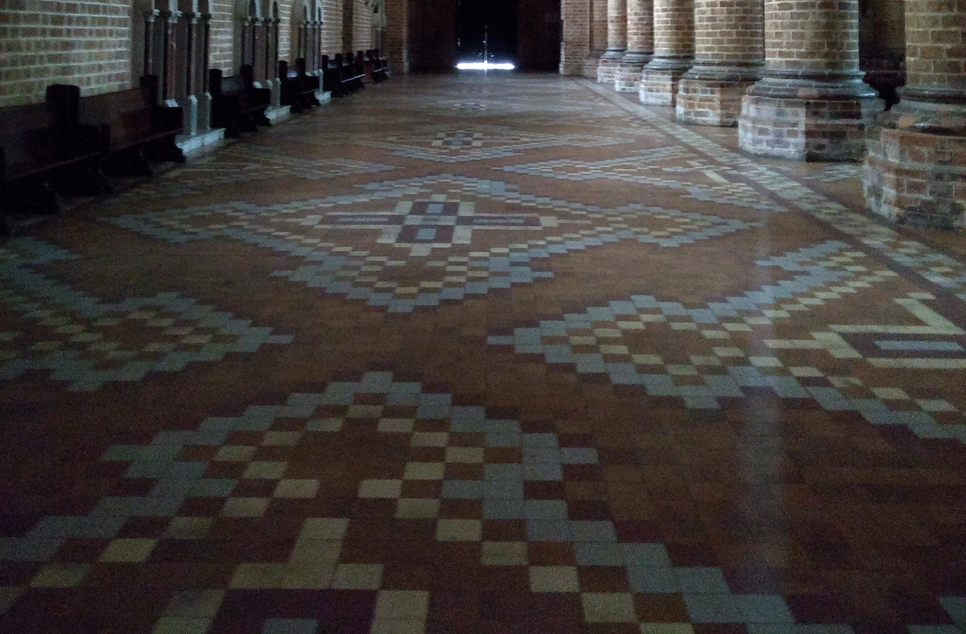 Pavimento de la nave lateral oriental de la Catedral de Medellín. Colombia